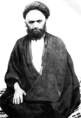 آیت‌الله سید علی قاضی در حدود سن ۵۰ سالگی